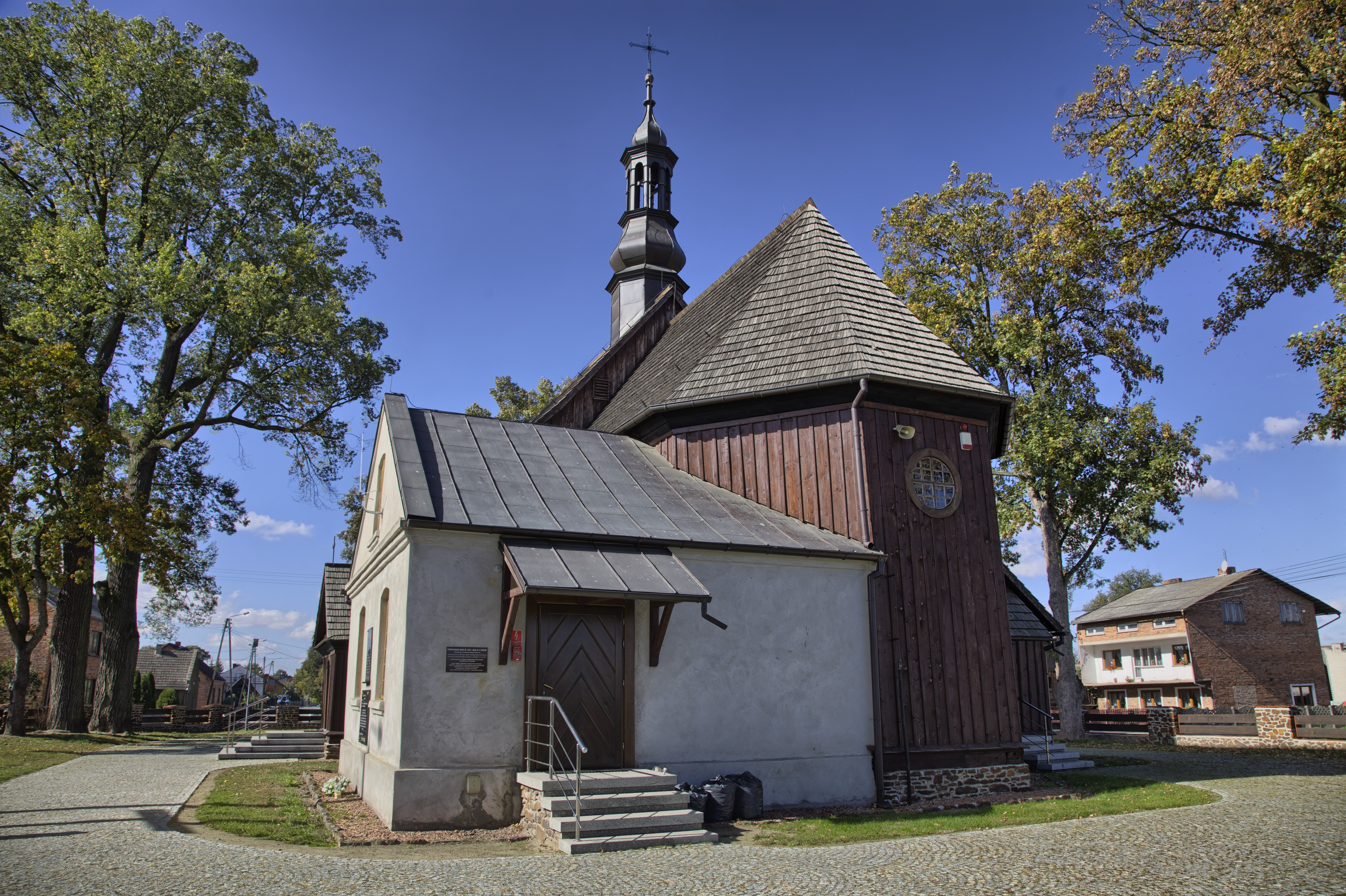 Skomlin, kościół śś. Filipa i Jakuba, 1740